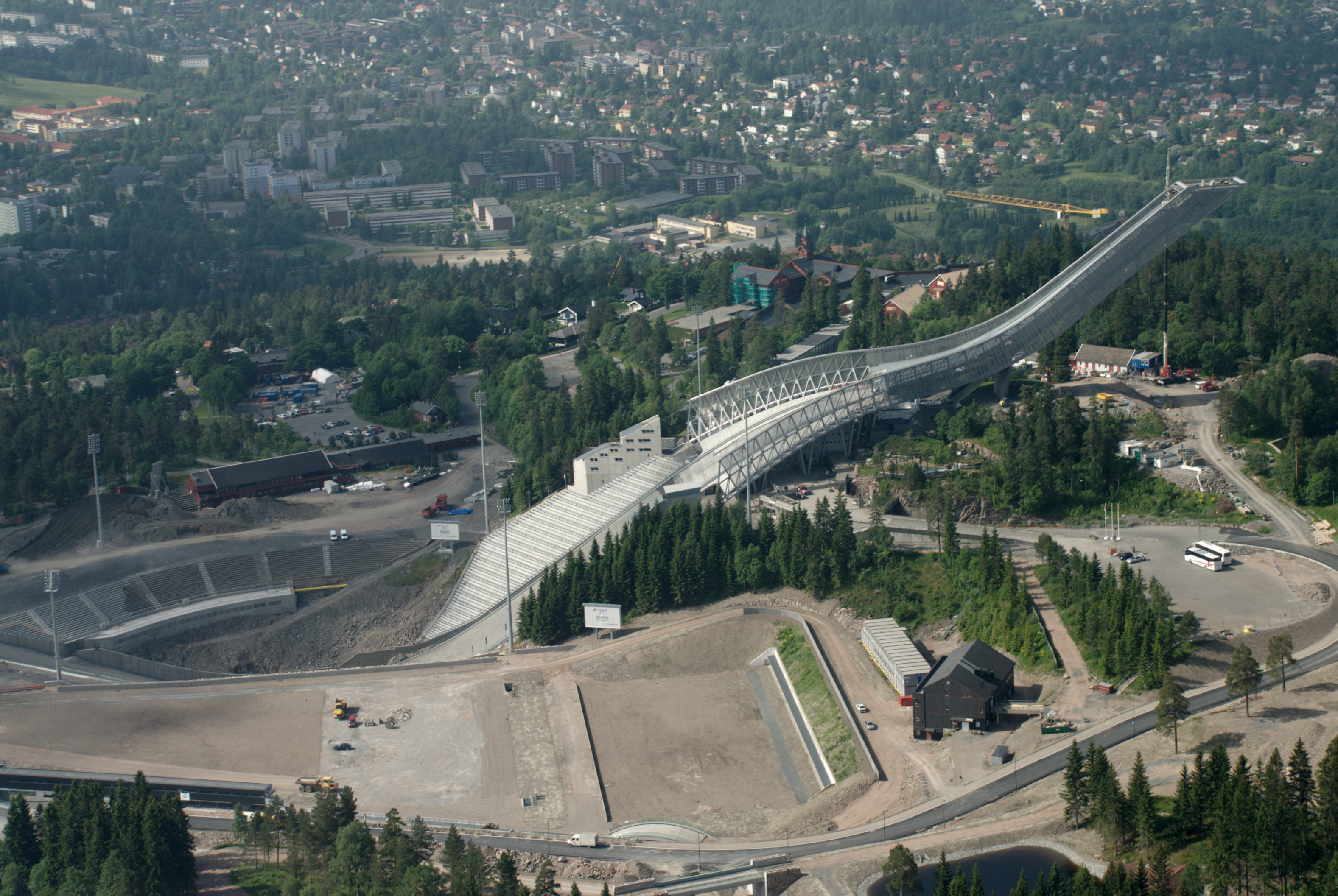 Holmenkollen